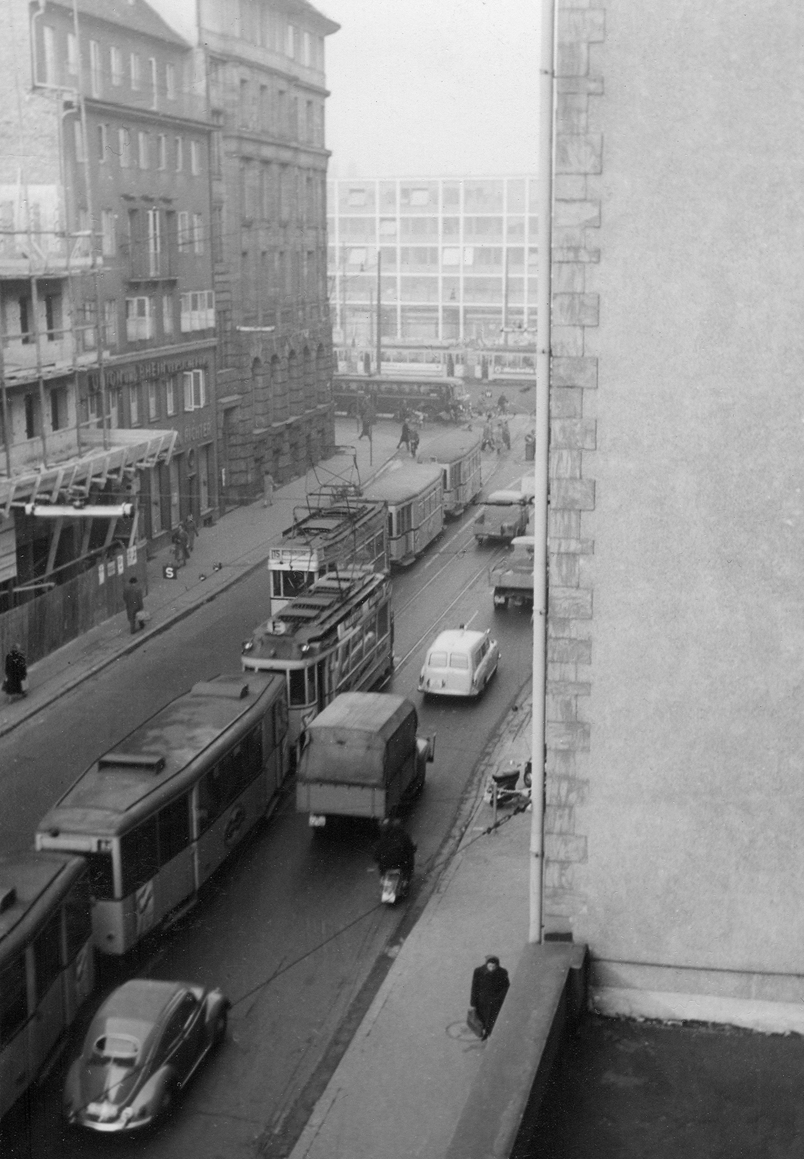 Blick um 1958 /1959 aus der Marienstraße 15 in Hannover in Richtung des Gebäudes Aegidientorplatz1 ...